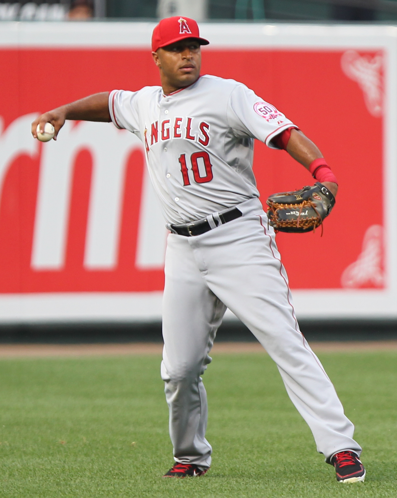 Vernon Wells